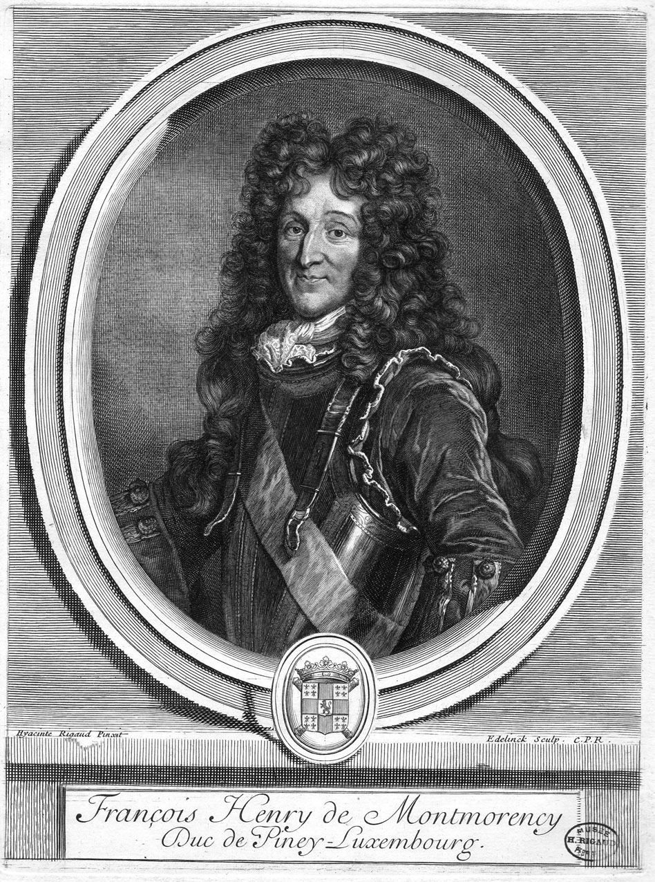 François-Henri de Montmorency-Bouteville, marcéhal de Luxembourg